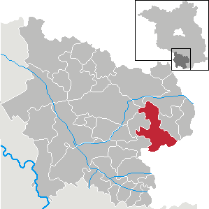 Finsterwalde in Brandenburg (Country) - District Elbe-Elster